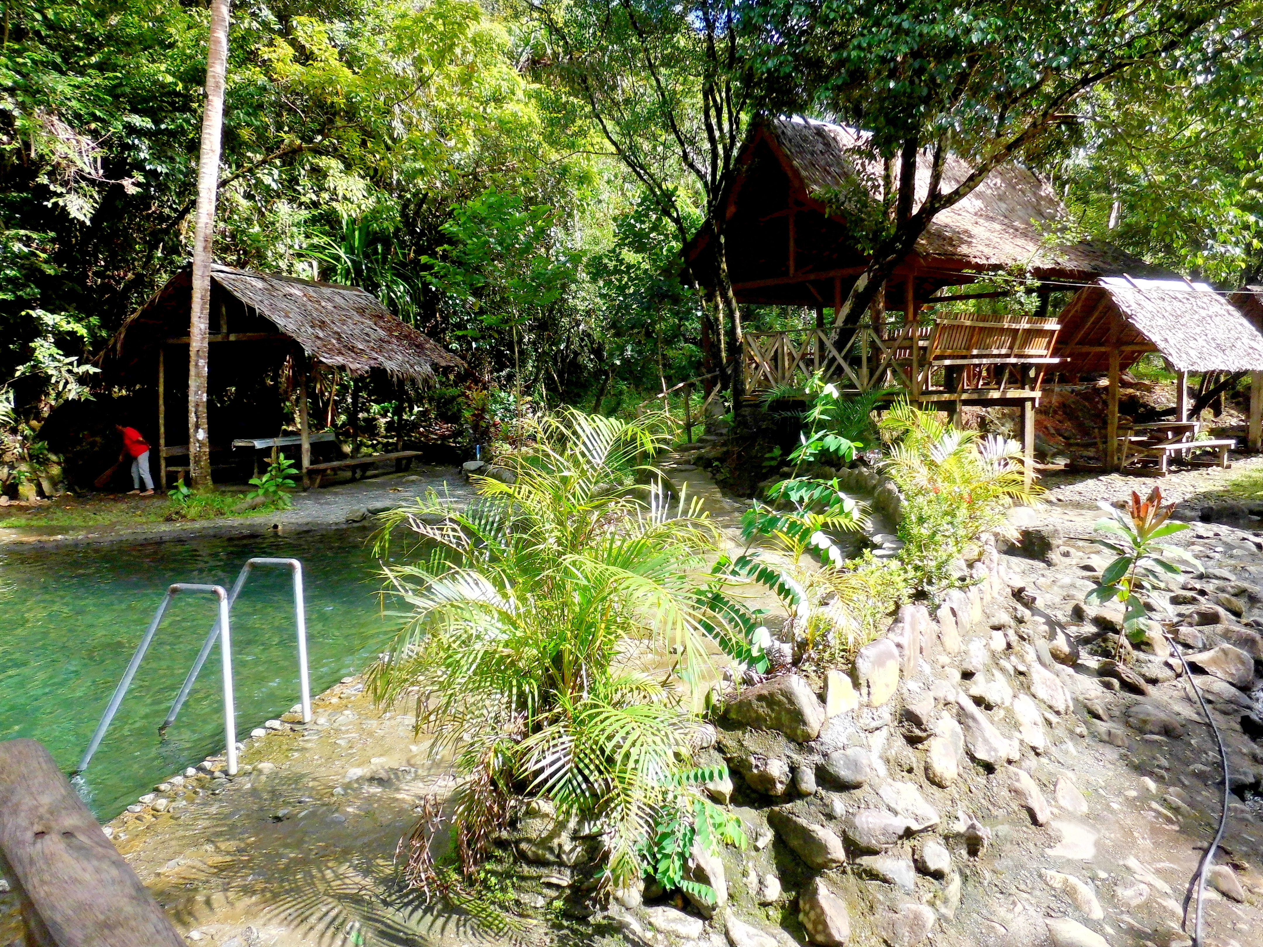 Urwaldbad "Sua cool spring" Sitzgruppen, Philippines, Surigao del Sur, Madrid (Esperanza)